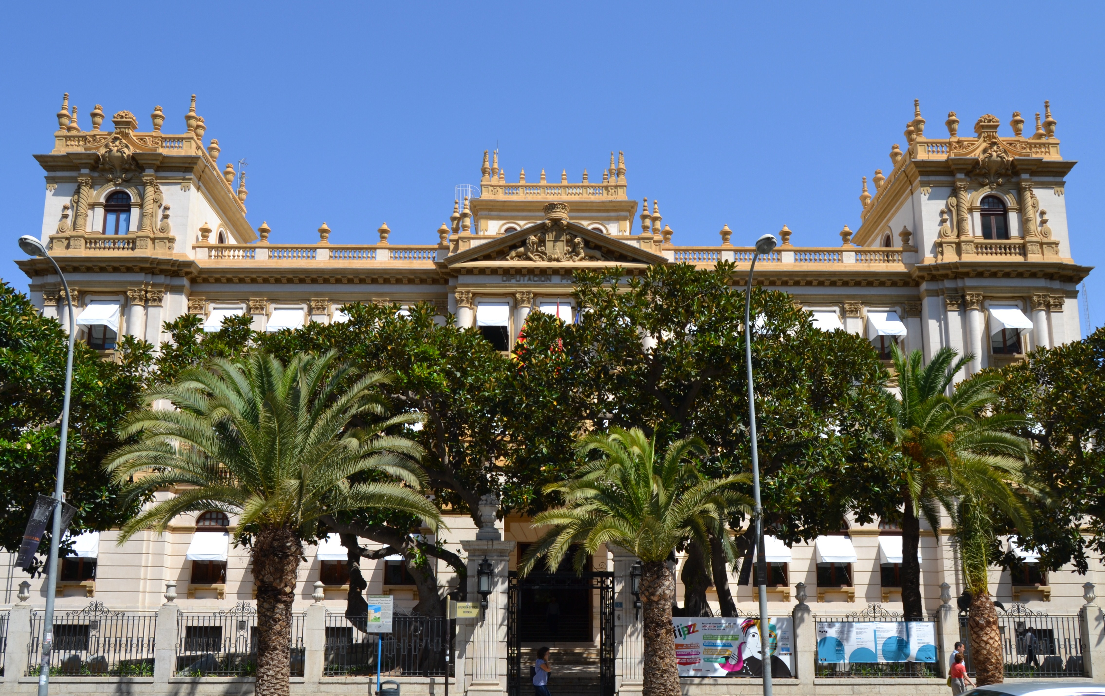 Palau de la Diputació d'Alacant.